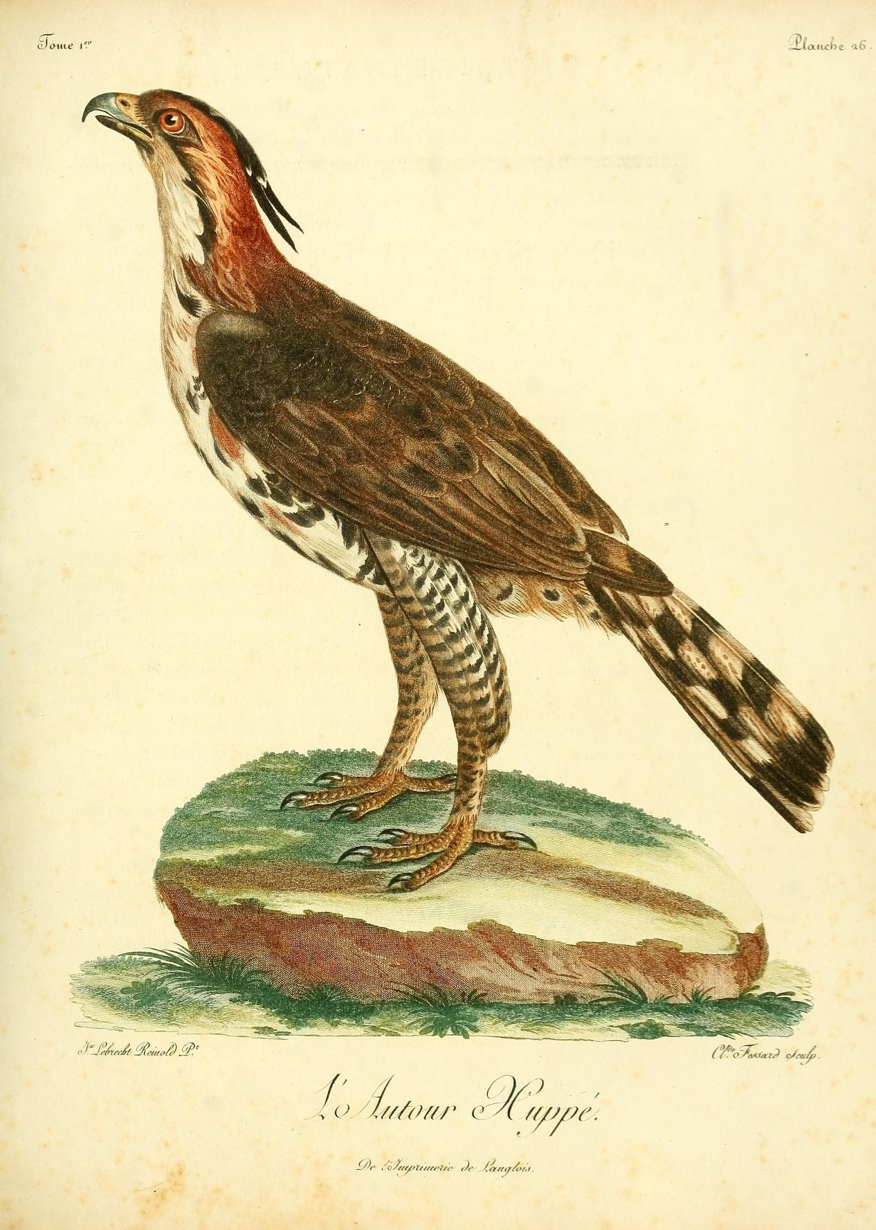 Histoire naturelle des oiseaux d'Afrique /. A Paris :Chez J.J. Fuchs, libraire ...,7, 1799-1808.